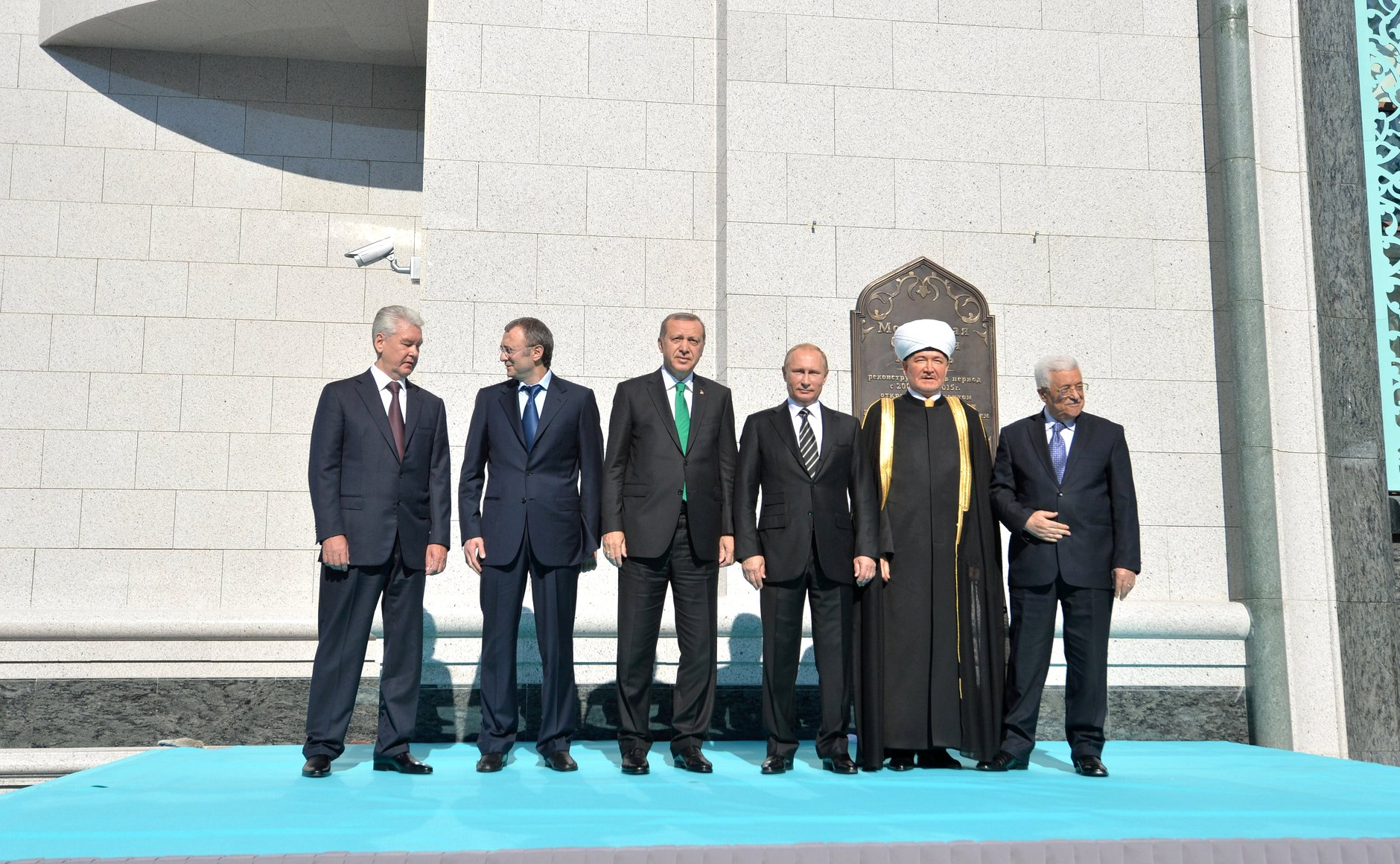 На открытии Московской соборной мечети после реконструкции. Слева направо: мэр Москвы Сергей Собянин, член Совета Федерации России от Дагестана Сулейман Керимов, Президент Турции Реджеп Тайип Эрдоган, Владимир Путин, председатель Совета муфтиев России Равиль Гайнутдин и председатель Палестинской Автономии Махмуд Аббас.